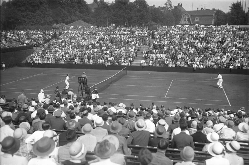 Zehntausende von Zuschauern beim Tenniskampf um den Davis-Pokal auf den rot-weiss-Plätzen in Berlin-Grunewald.! Blick auf das Spiel des amerikanischen Tennismeisters (rechts) Tilden gegen den deutschen Meister Moldenhauer (links) auf den Rot-weiss-Plätzen in Berlin-Grunewald. Das Spiel gewann der Amerikaner Tilden.